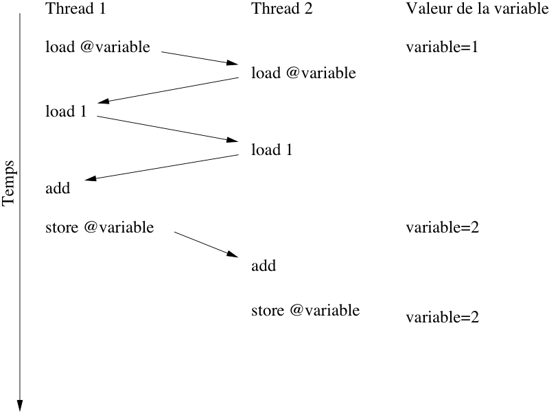 Description: Cette image présente un exemple d'accés concurrent à une variable avec une erreur en résultatSource: Mathieu Boretti